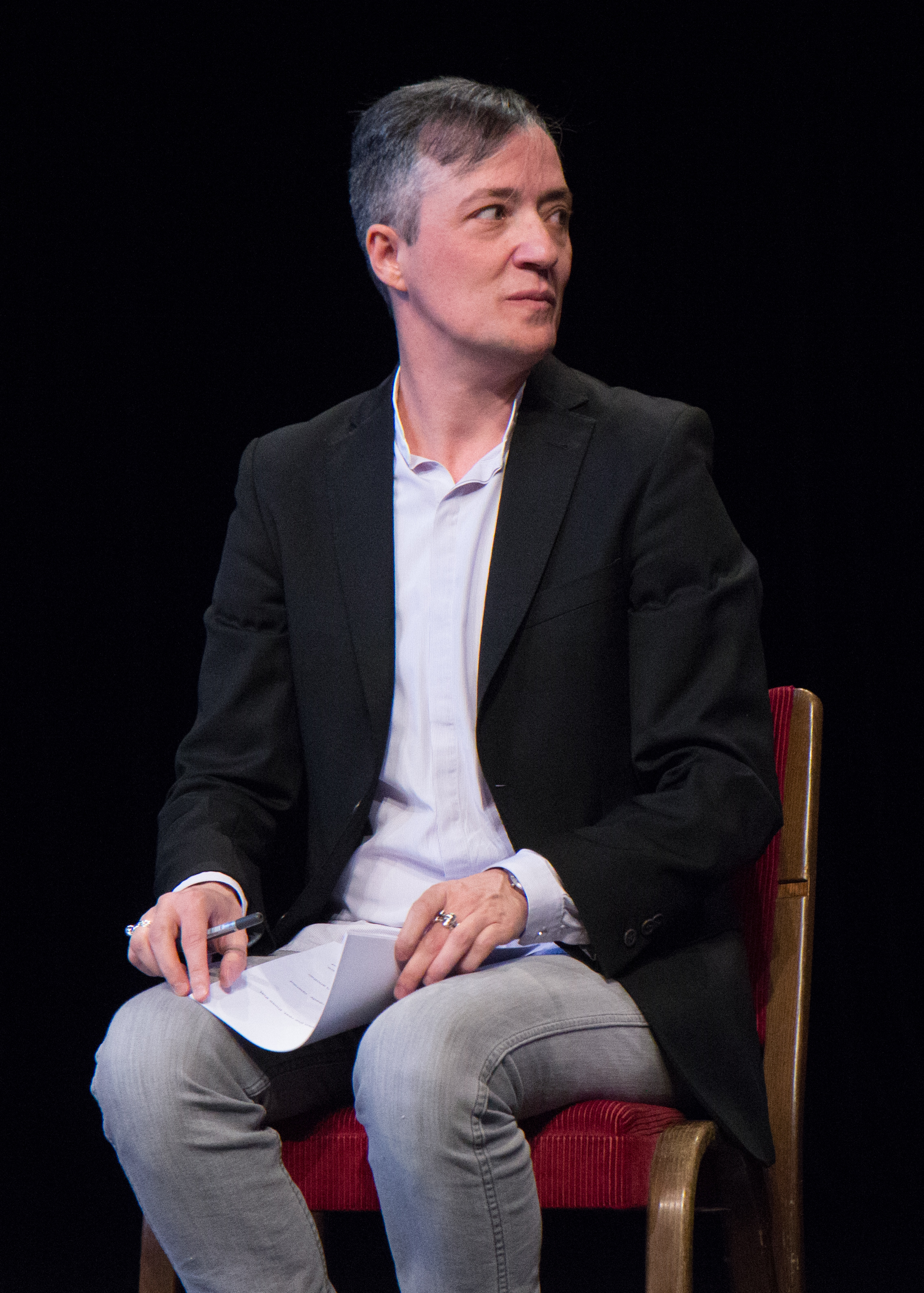 Documenta 14 in Kassel: Paul B. Preciado im Rahmen der Eröffnungskonferenz der Documenta 14 am 7. Juni 2017 in Kassel